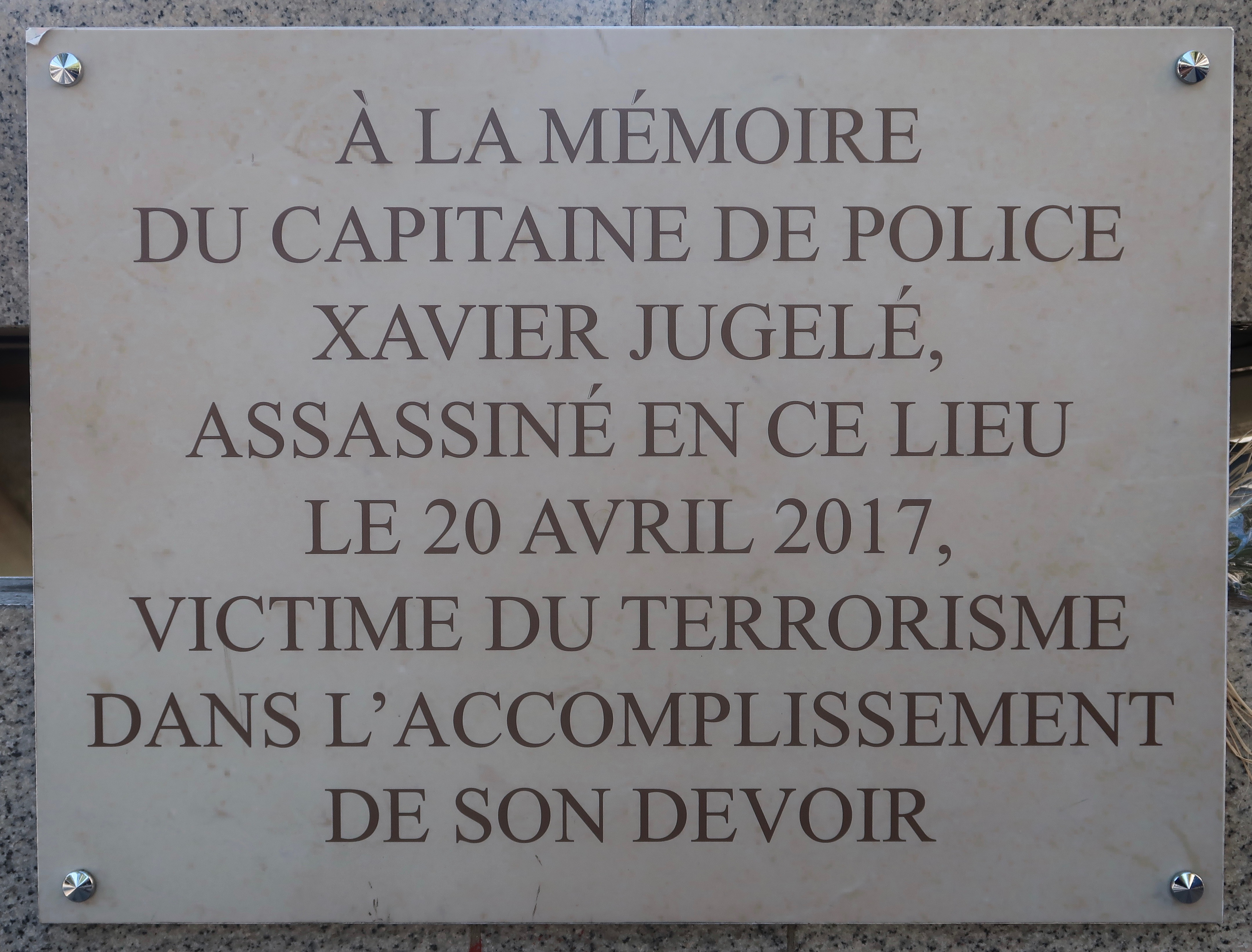 Plaque en hommage à Xavier Jugelé, 102 avenue des Champs-Élysées (Paris, 8e).